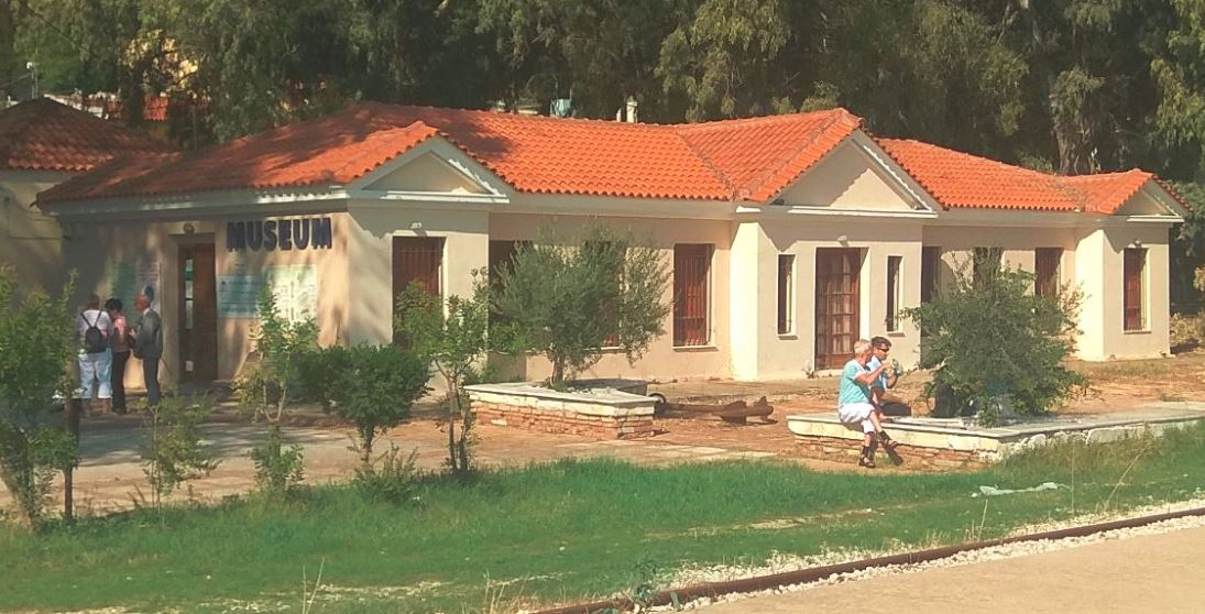 מבנה המוזיאון בעיירת הדיג קטקולו